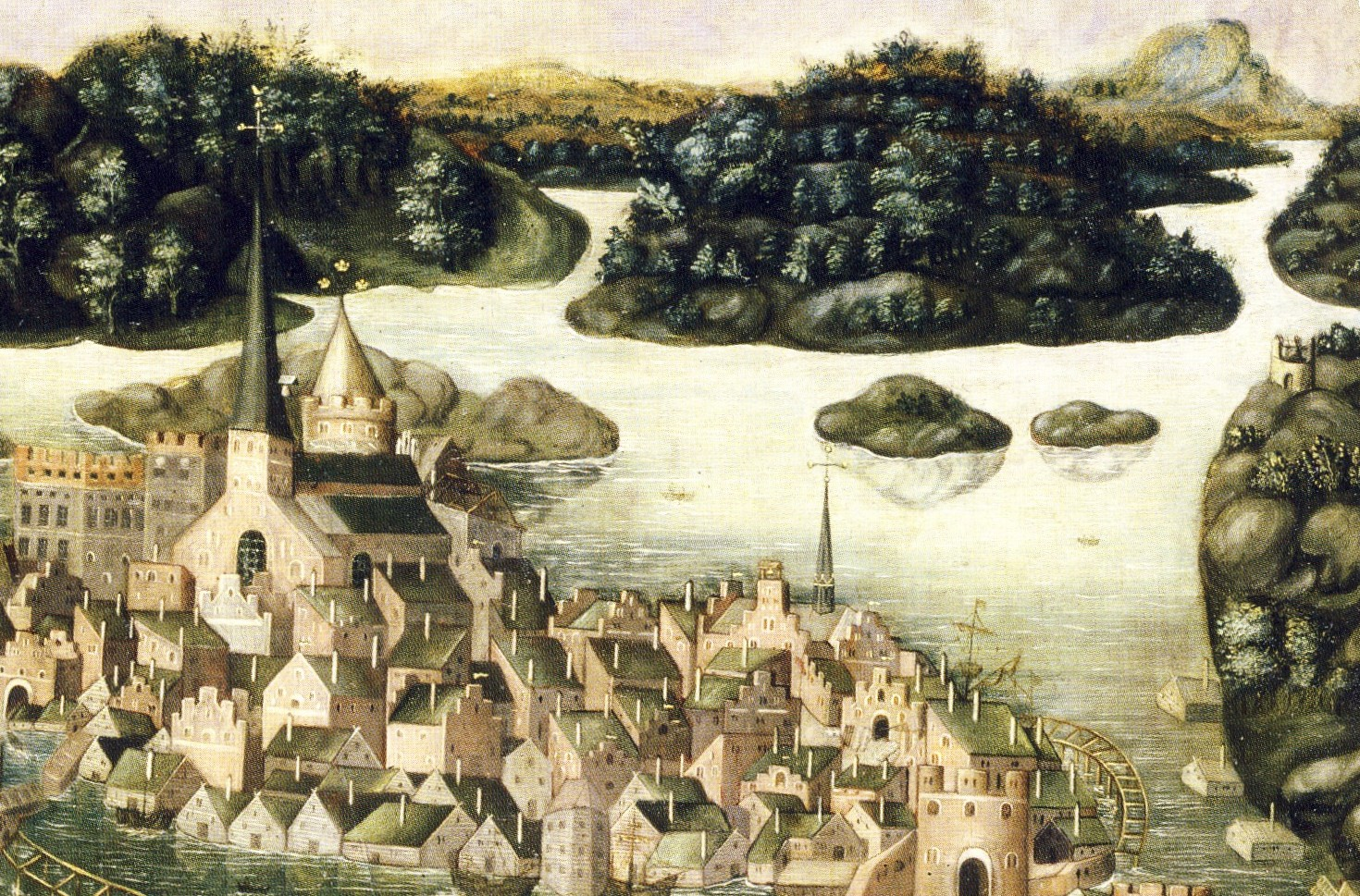 "Vädersolstavlan", ursprungligen målad av Urban målare 1535, hänger i Storkyrkan i Stockholm. Det är den äldsta bilden av Stockholm och finns avbildad på tusenkronorssedeln. Den nuvarande bilden är dock en kopia från 1630-talet av Jacob Elbfas. Utsnitt.